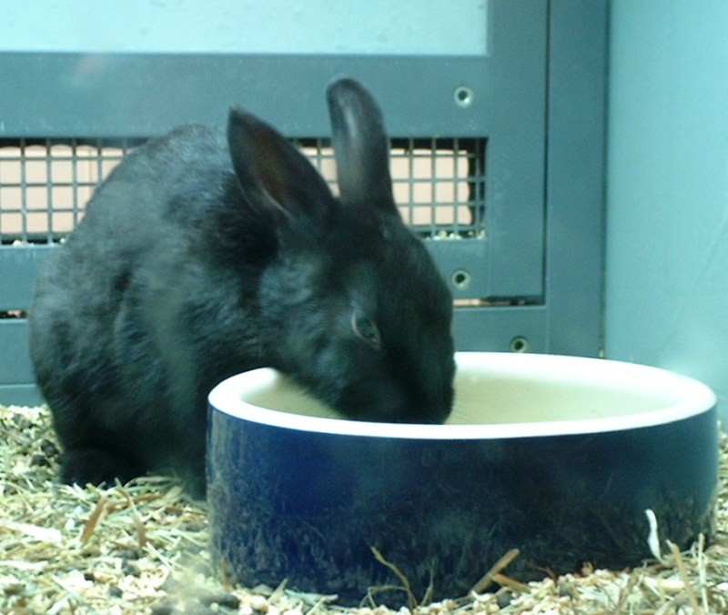 lapin domestique en clapier